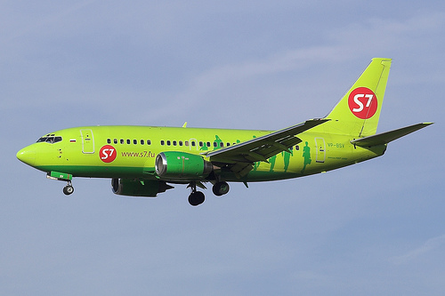 S7 Airlines Boeing 737-500 VP-BSV